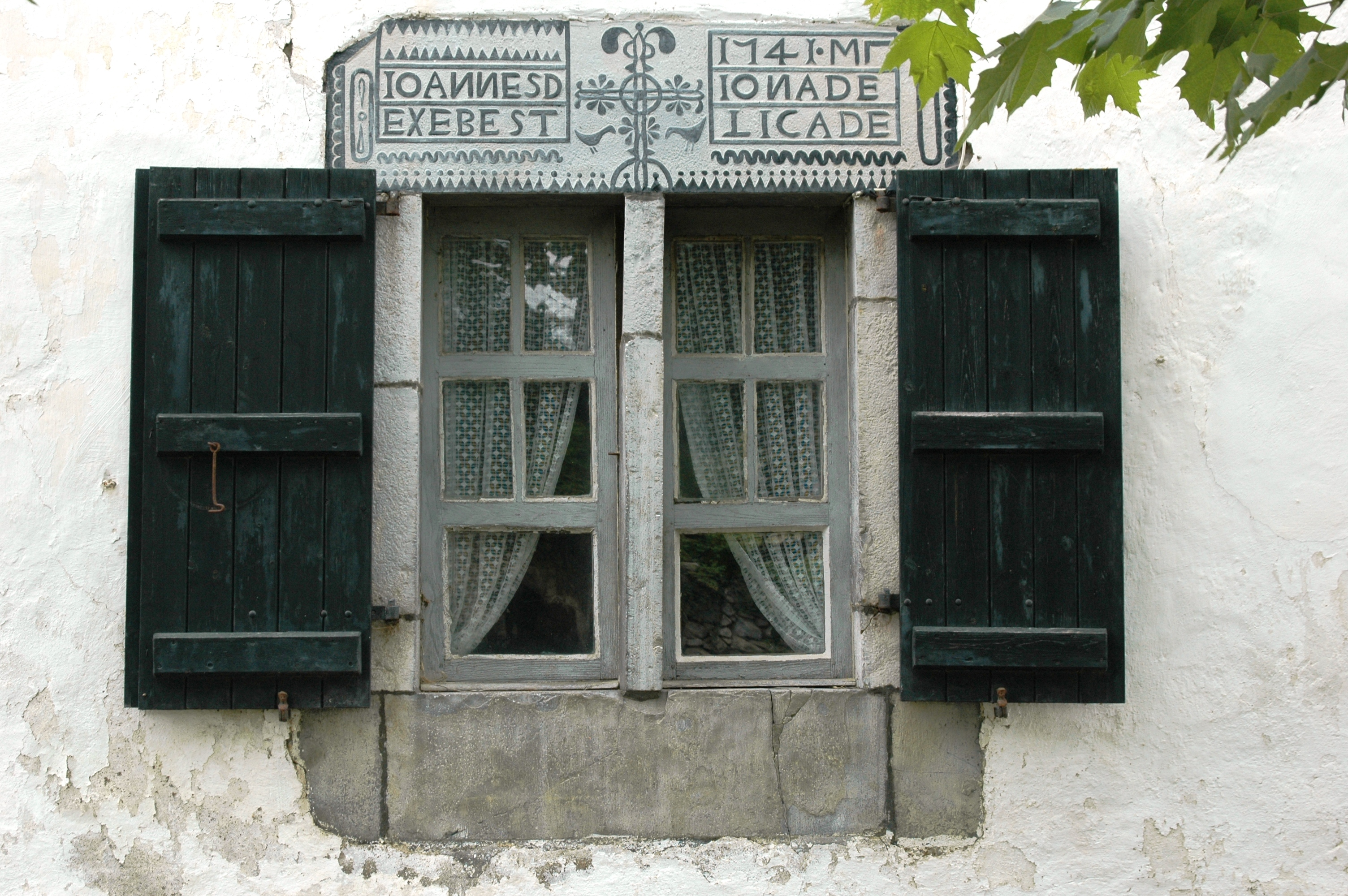 Fenêtre avec linteau sculpté à Ainhice-Mongelos